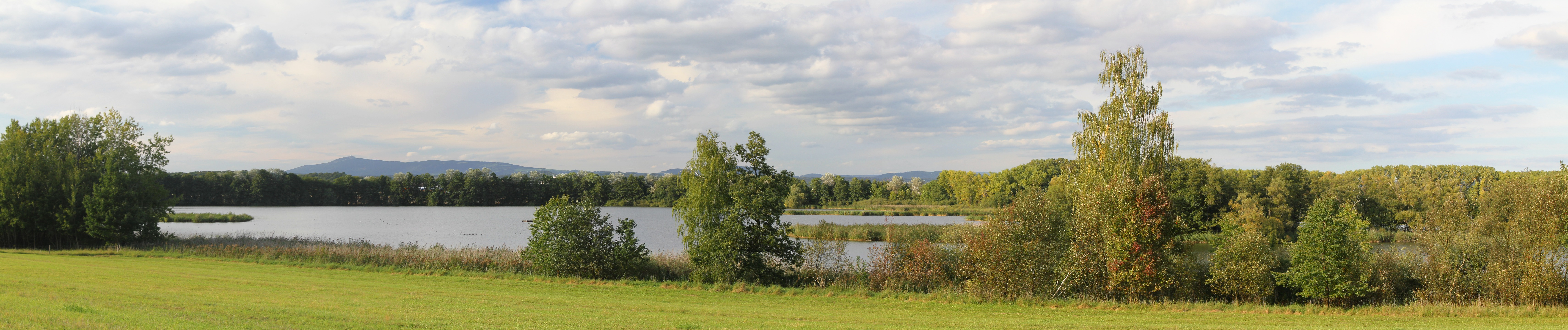 Žabakor